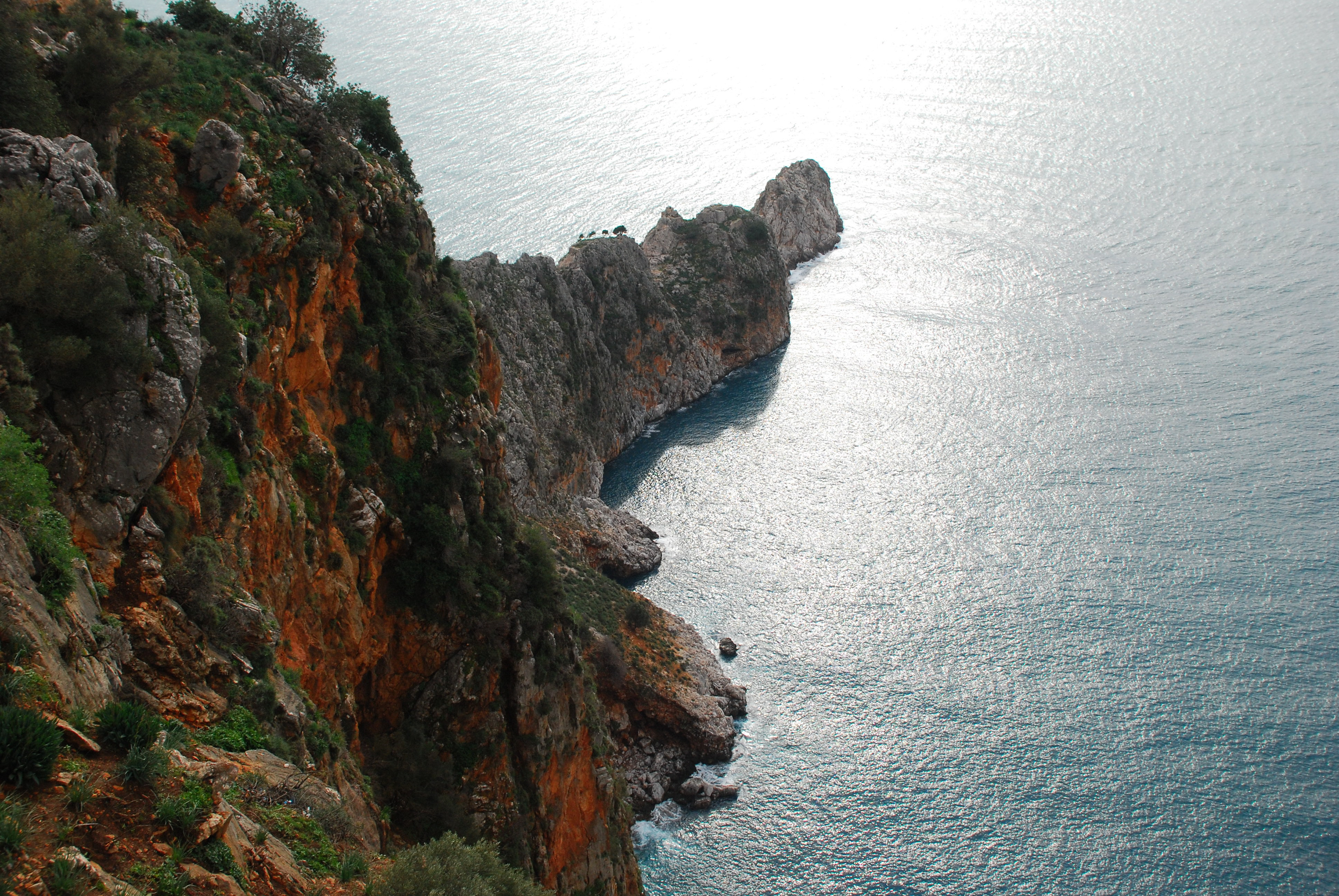 Alanya Kalesinden-1